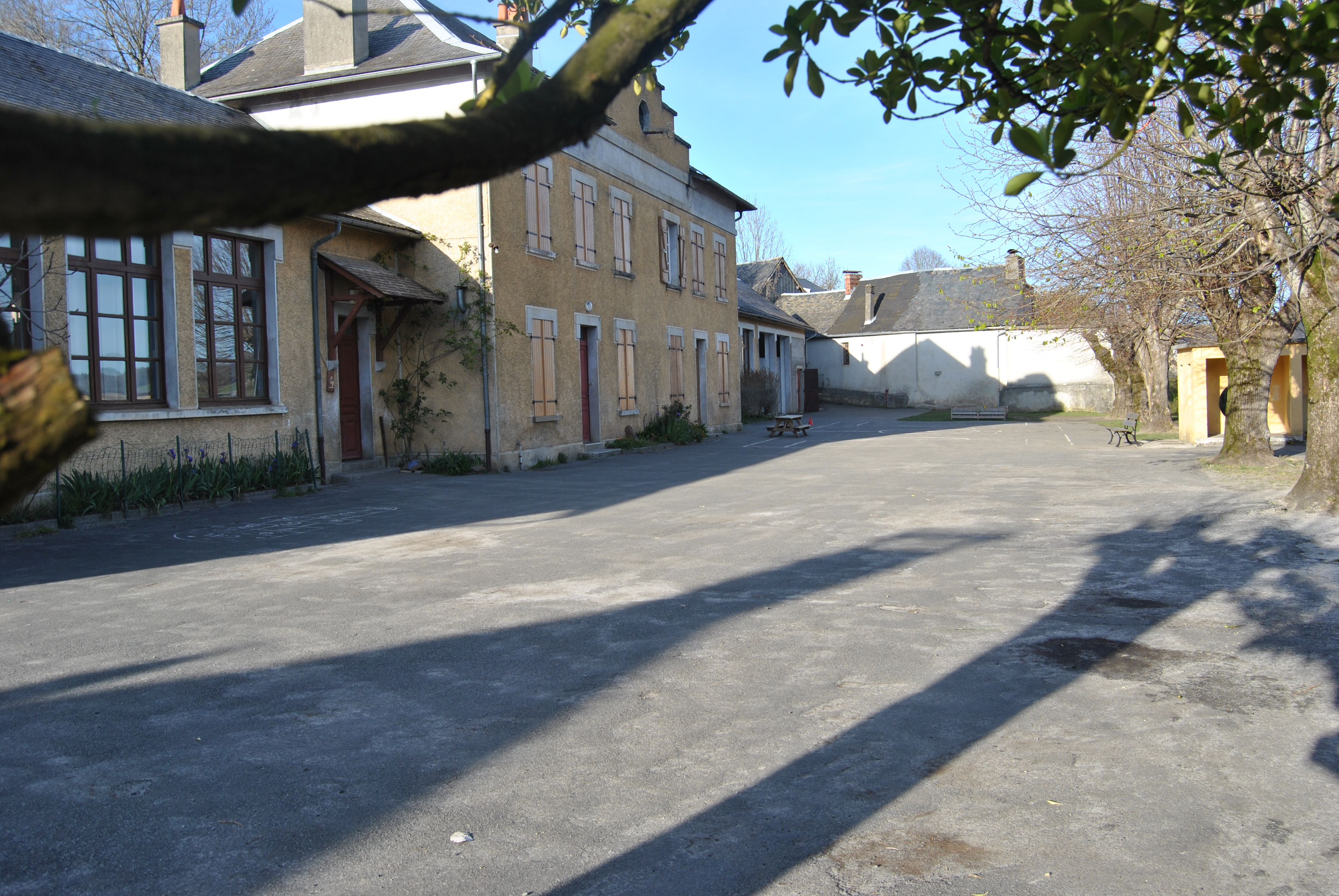 Cour de l'école d'Avezac (commune d'Avezac-Prat-Lahitte / 65130).